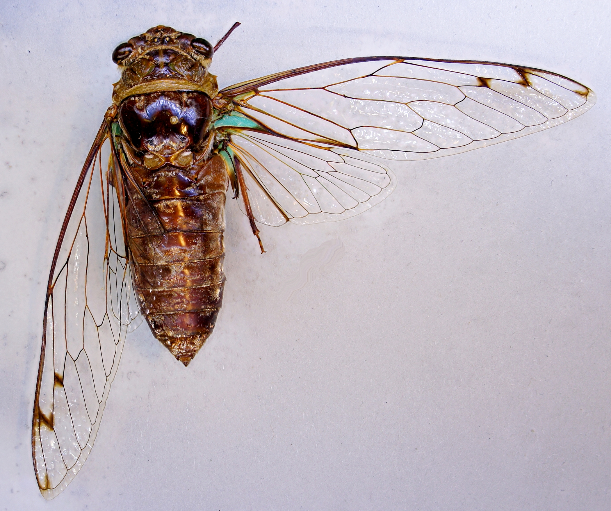 Platylomia viridimaculata (Distant, 1889) Herkunft: Malaysia, Borneo